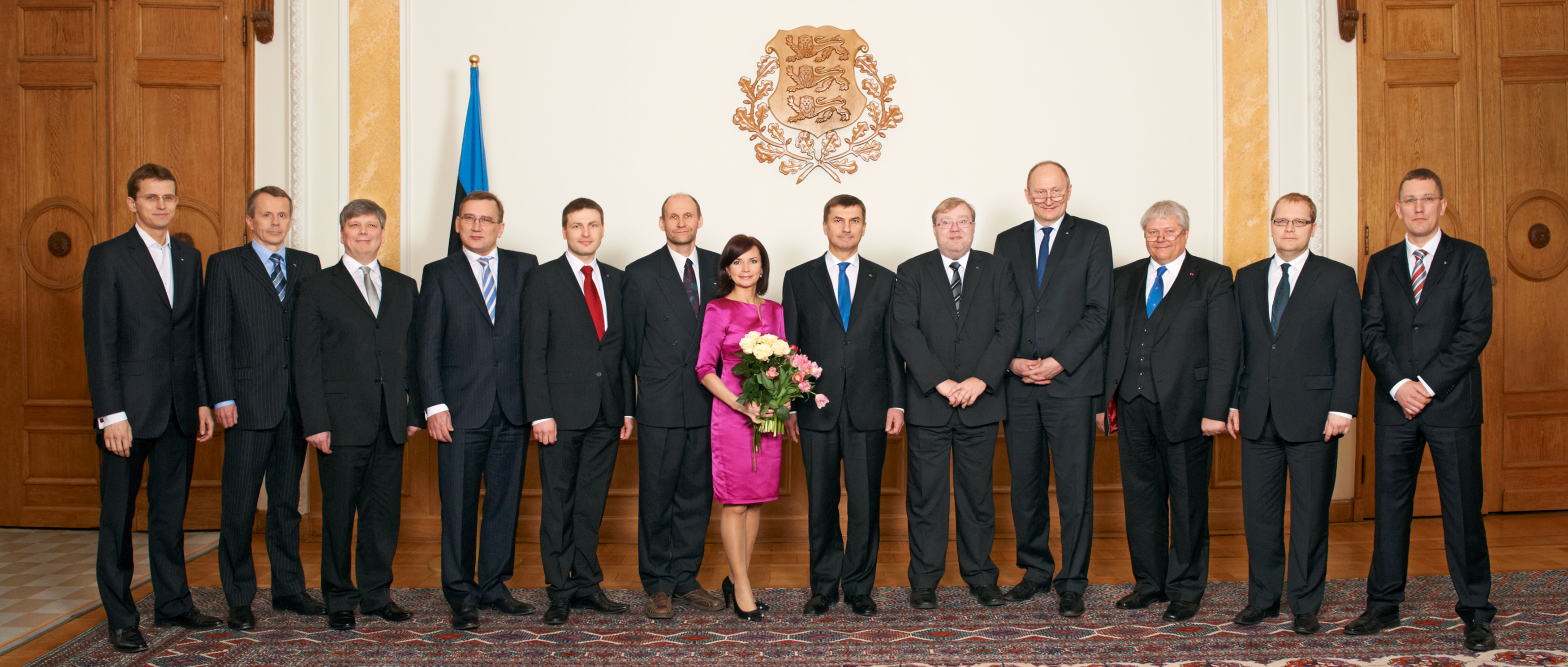 46. Vabariigi Valitsuse ametivande andmine Riigikogus